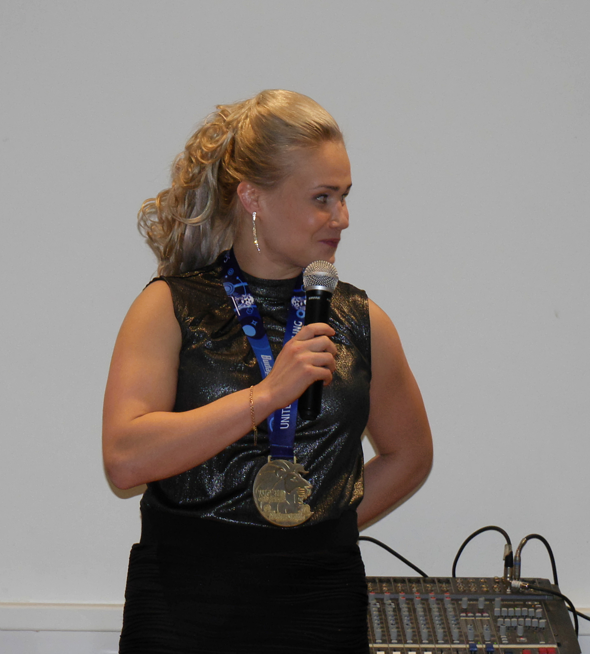 Petra Olli marraskuussa 2018.